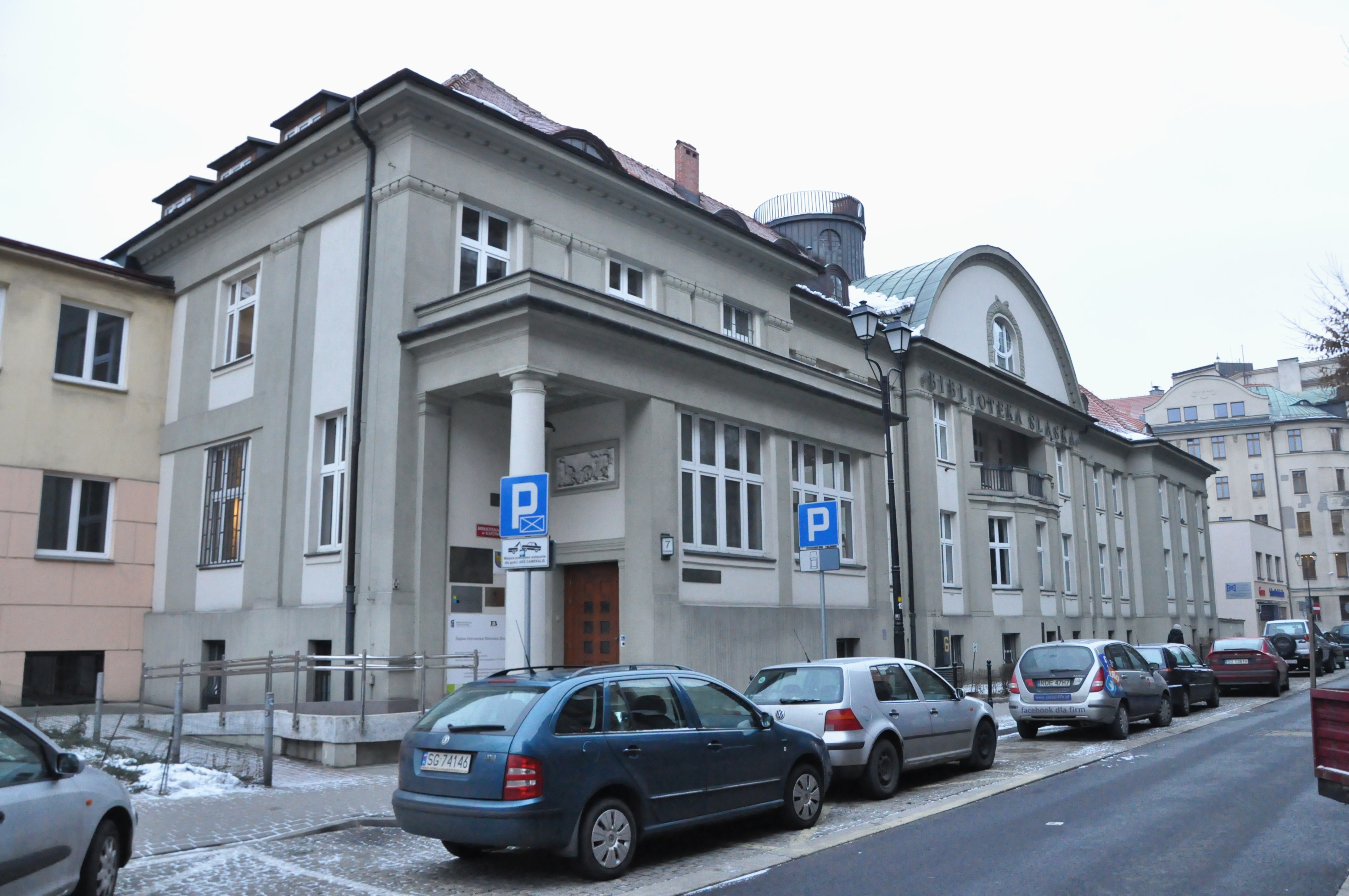 Widok budynku od strony ul. J. Ligonia